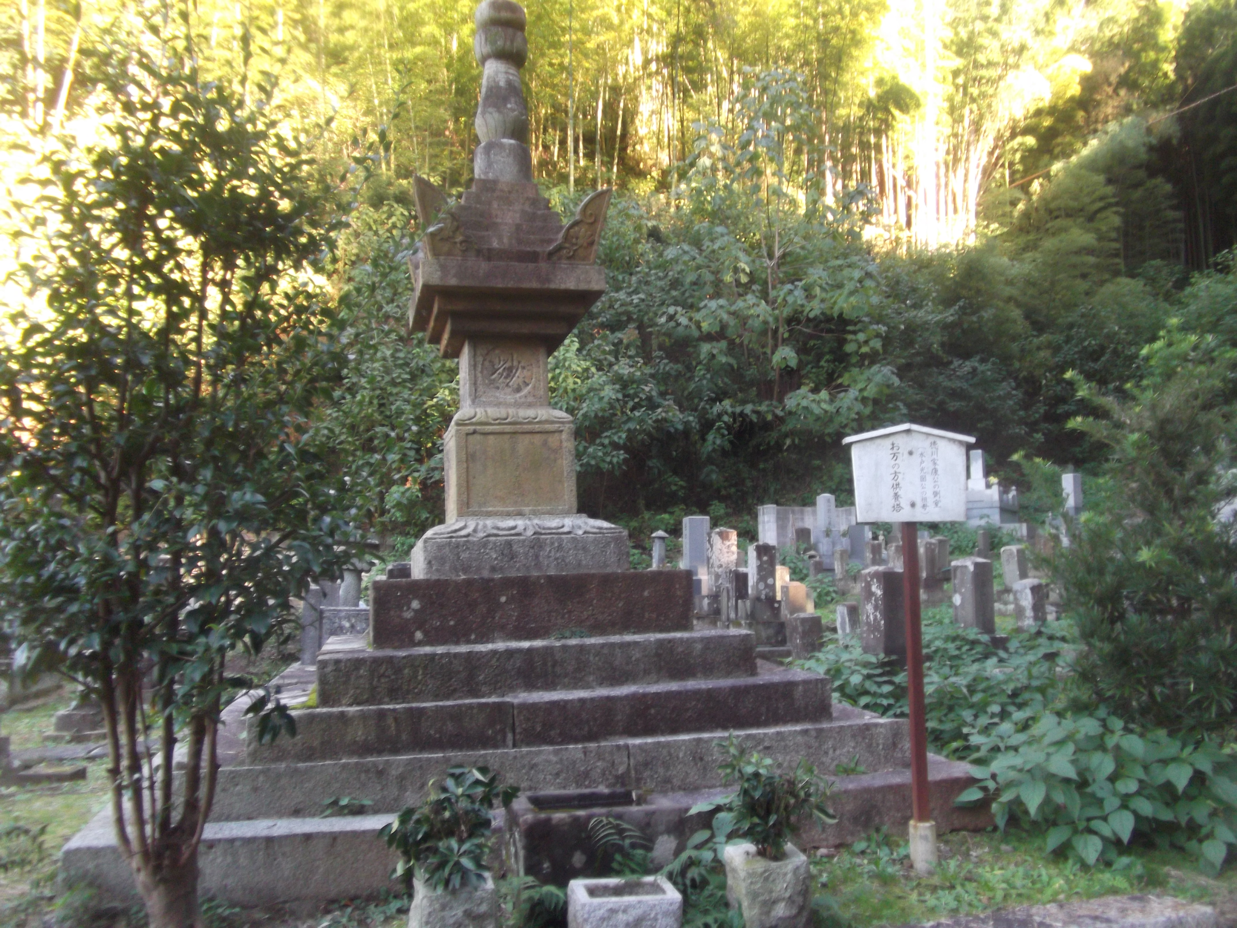 静岡市葵区沓谷にある貞松山蓮永寺。養珠院供養塔。